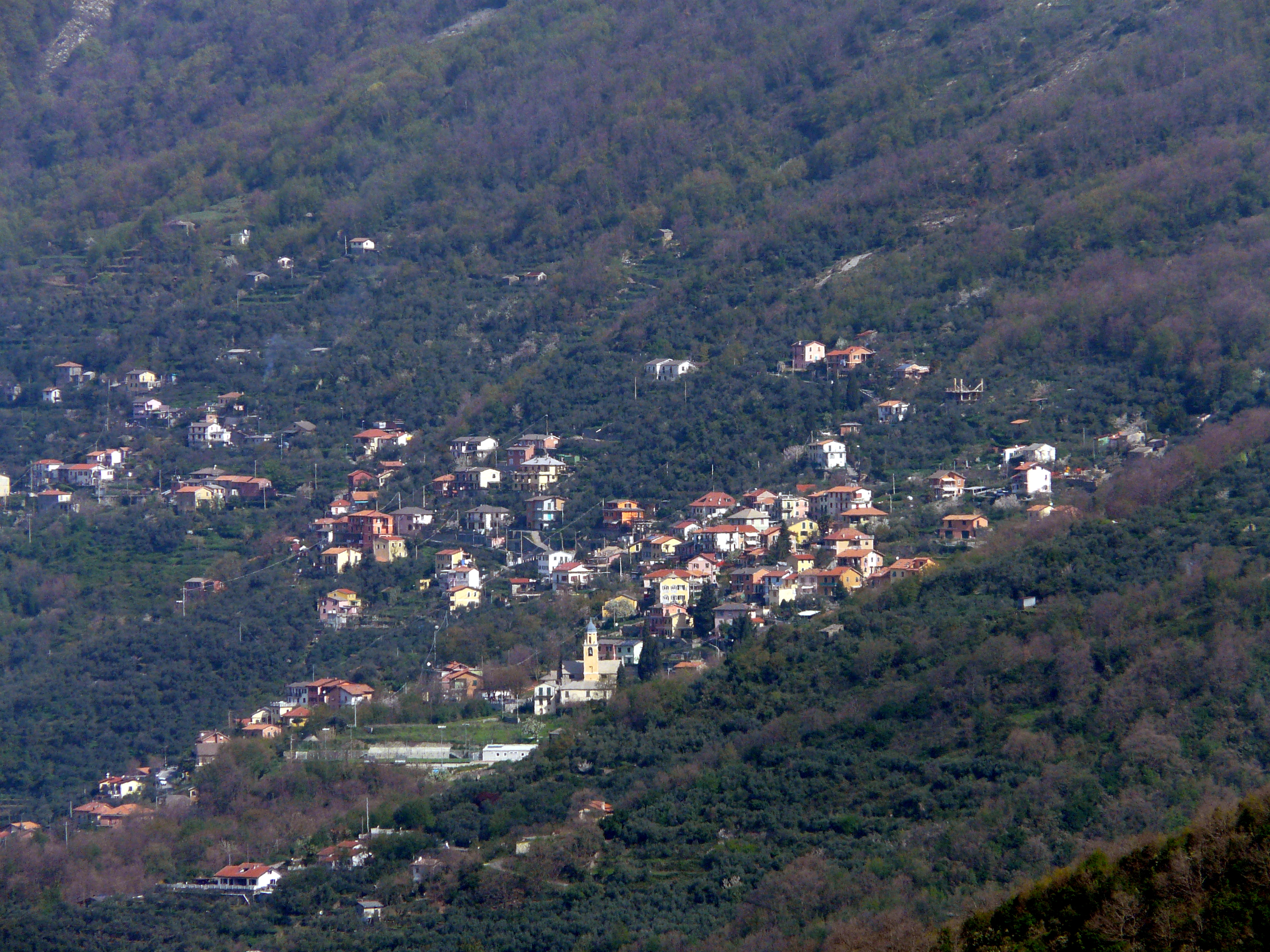 Panorama della frazione di Testana di Avegno dal percorso verso il santuario della Madonna di Caravaggio (Rapallo), Liguria, Italia